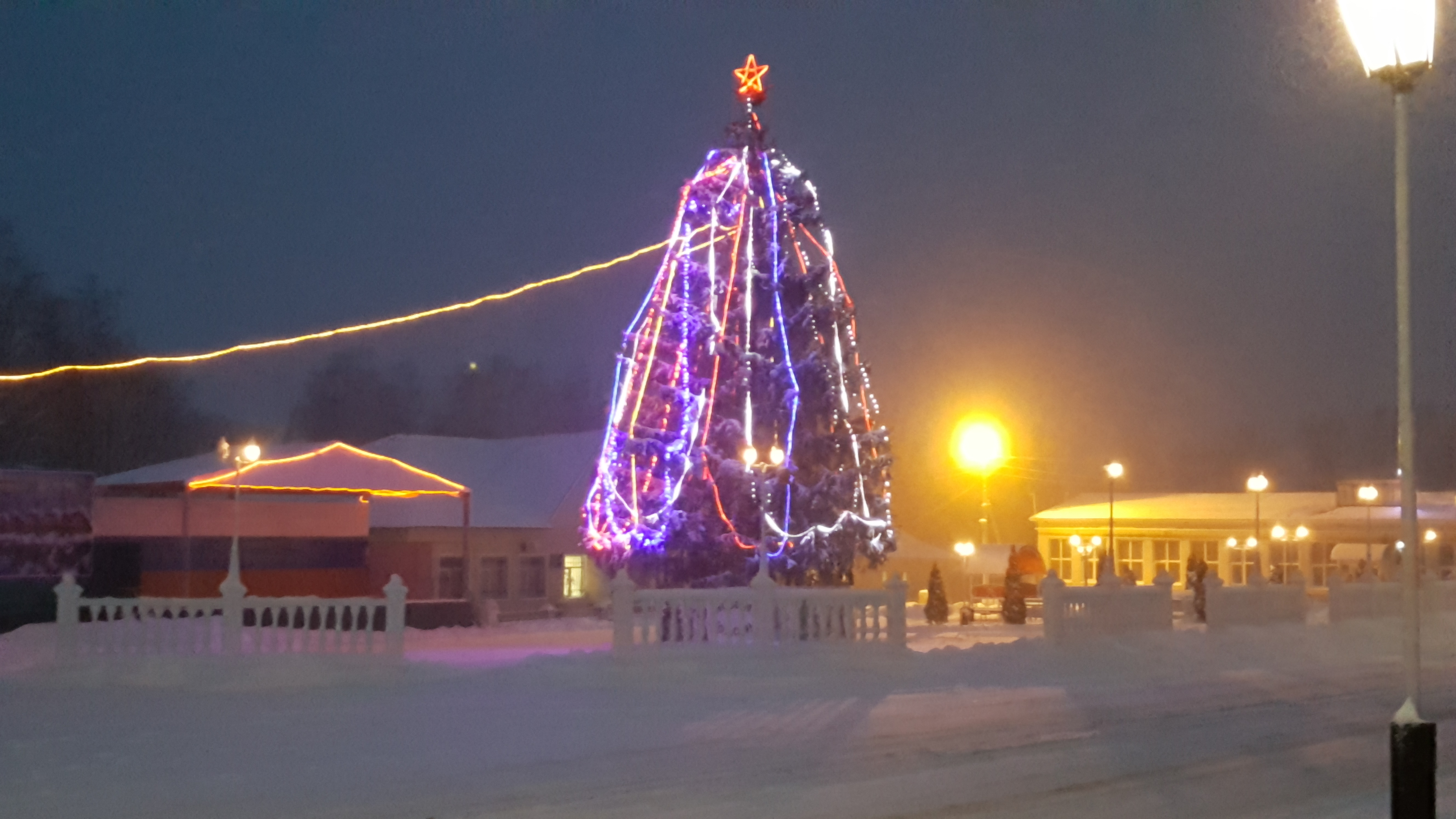 Новогодняя Ель на Центральной площади